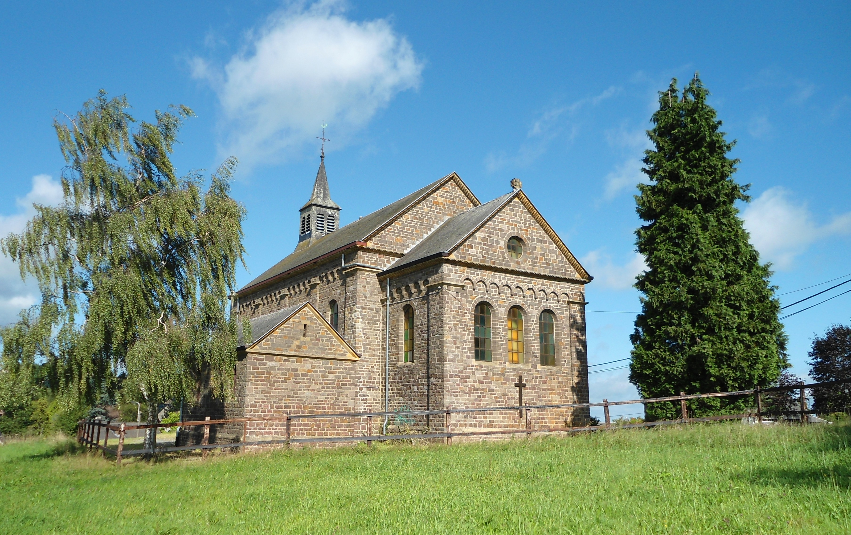 Chapelle de Housssonloge